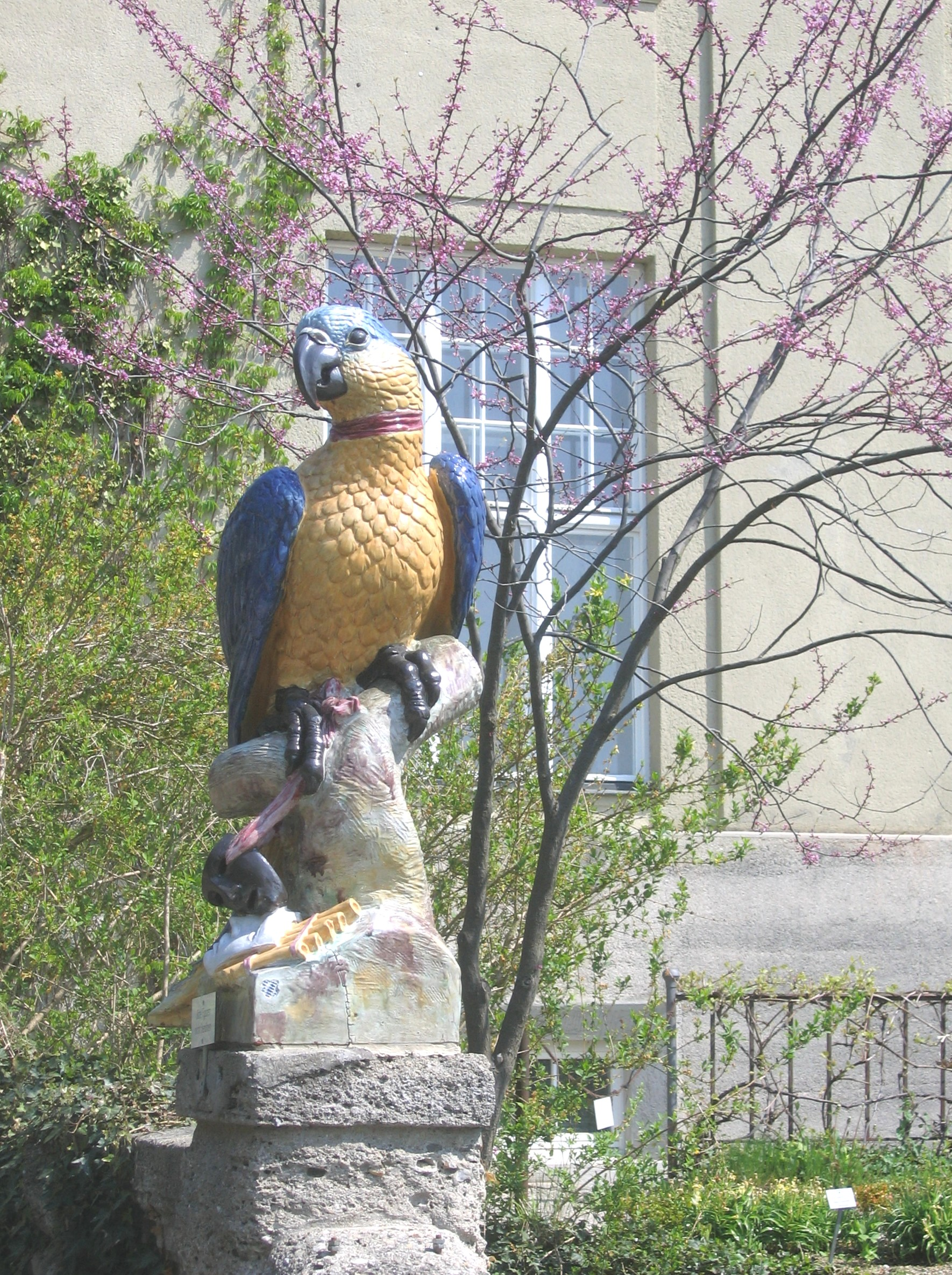 Papagei mit Maske von Joseph Wackerle im Botanischen Garten in München